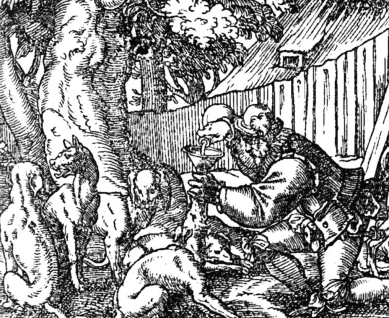 Petrus De Crescentiis, Behandlung eines Jagdhundes, Ausschnitt, Holzschnitt